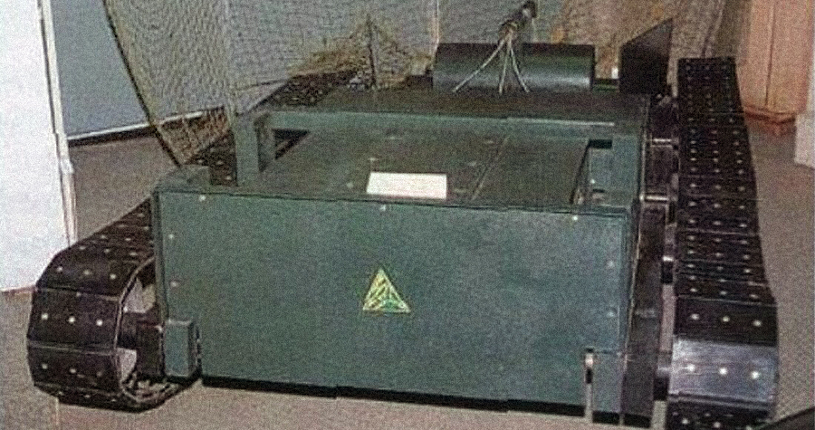 ЭТ-1-627